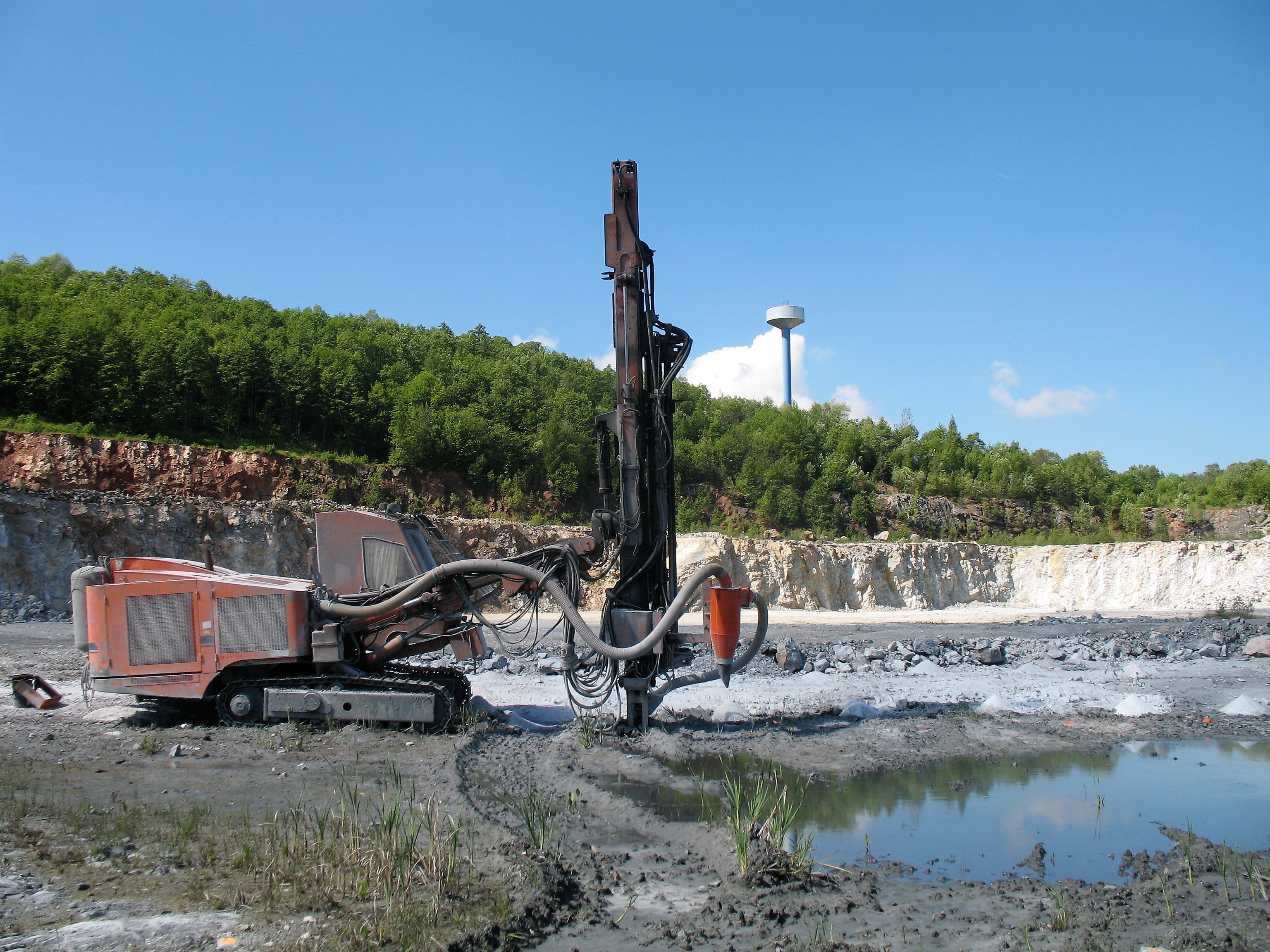 Lom Prachovice, květen 2017